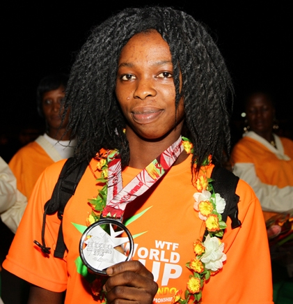 Mamina Kone, championne de taekwondo ivoirienne